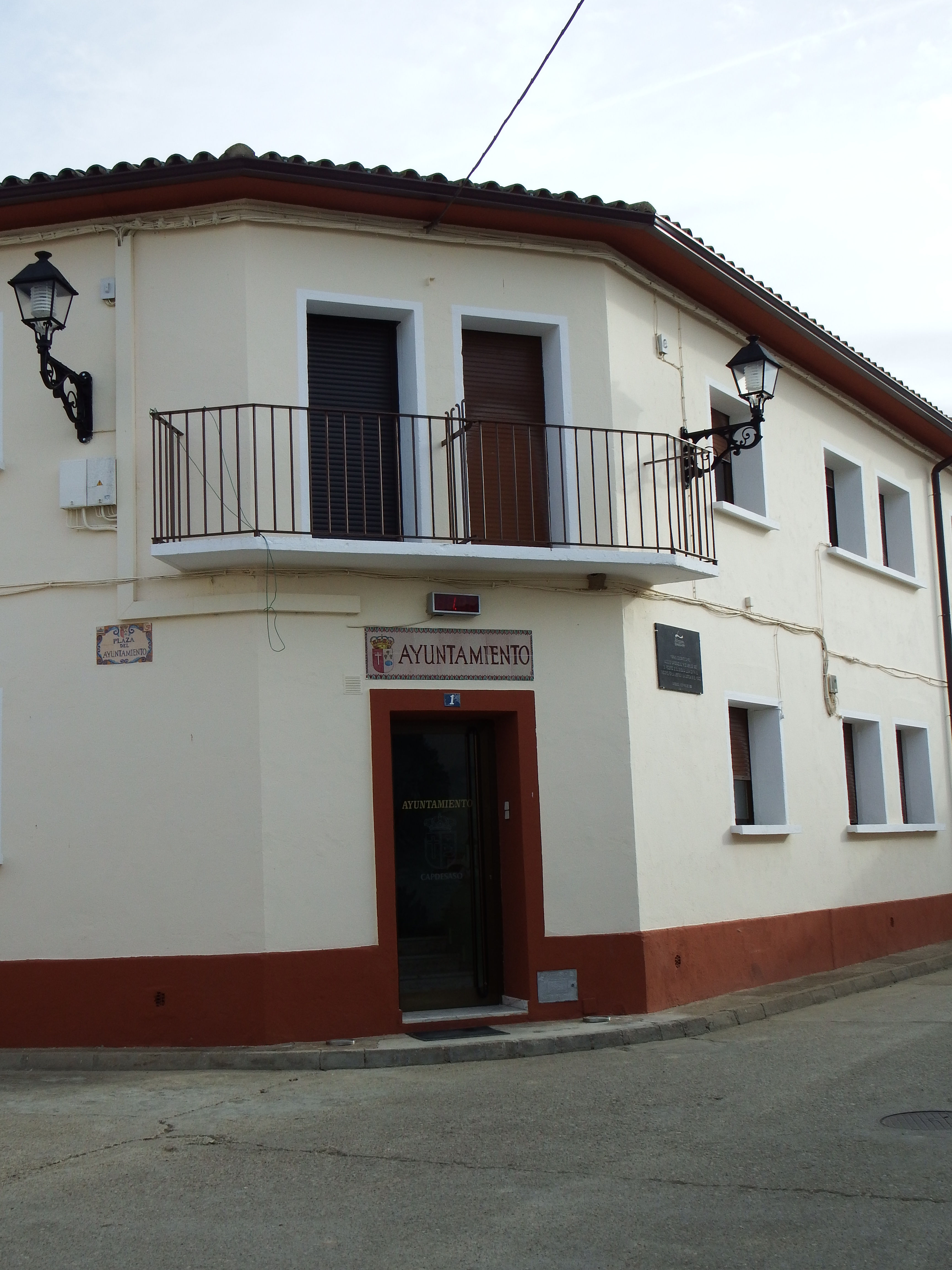 Capdesaso